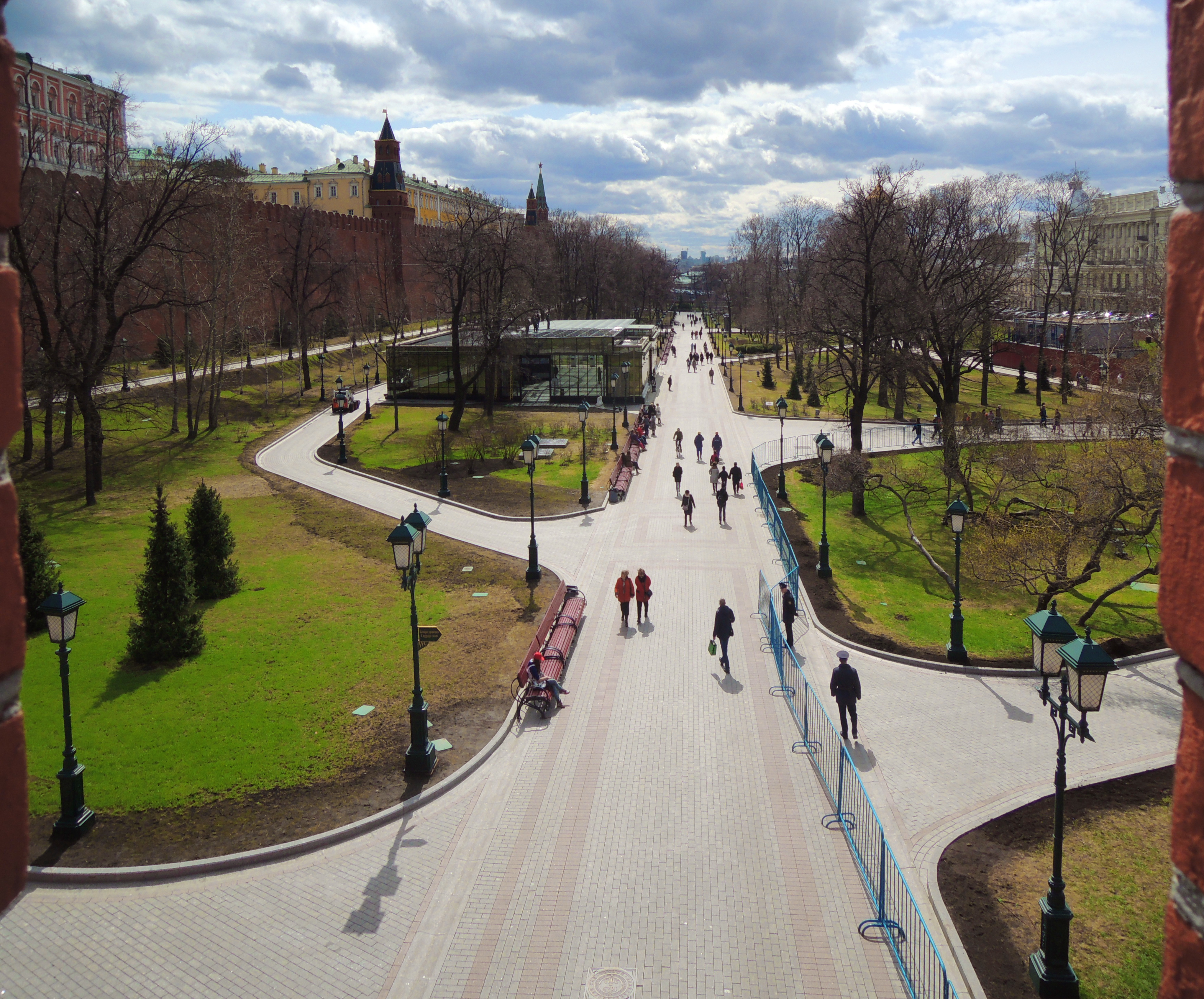 Александровский сад. Вид с Троицкого моста